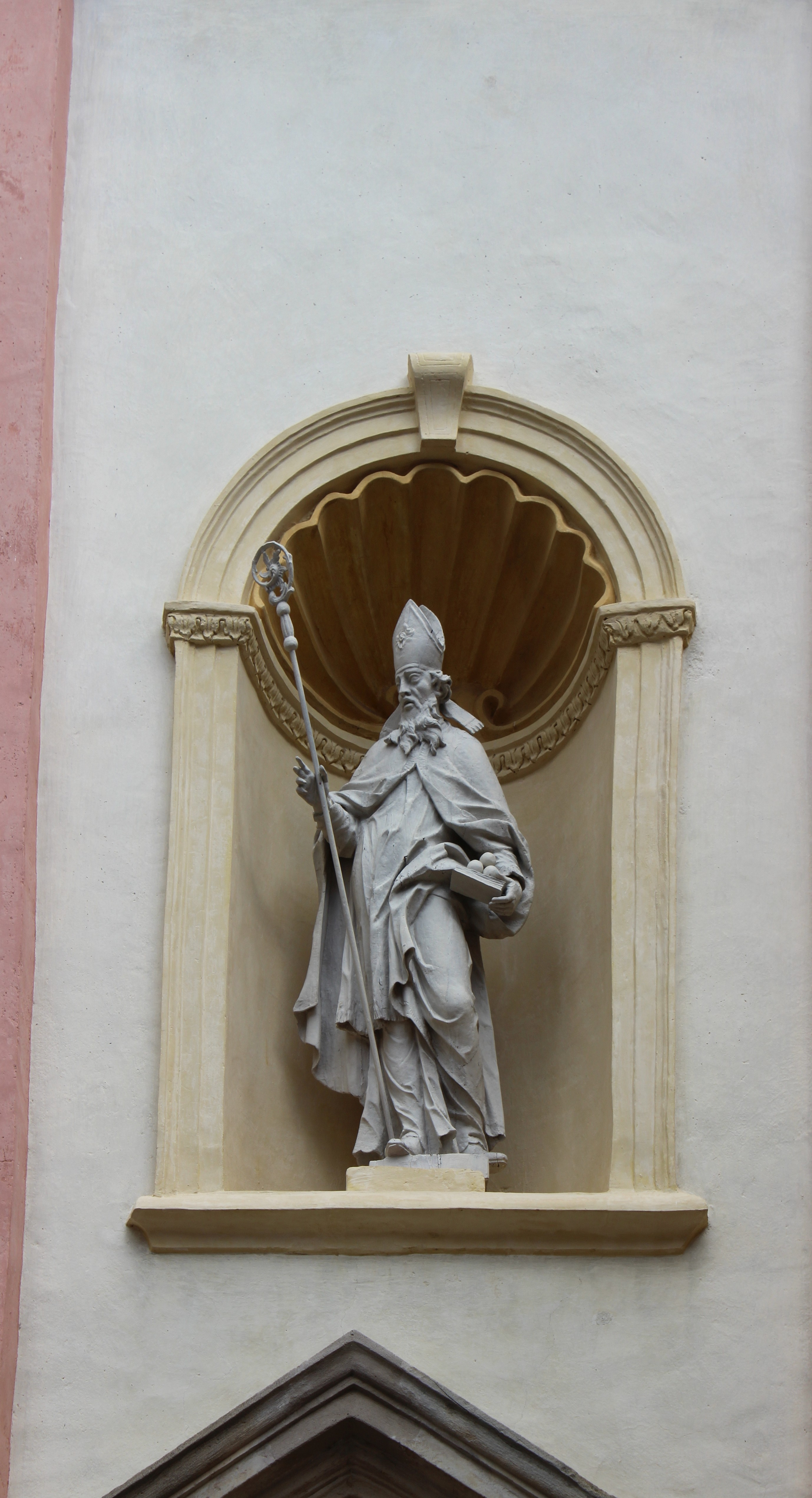 Rundbogennische an der Pfarrkirche zur Schmerzhaften Muttergottes in Riffian